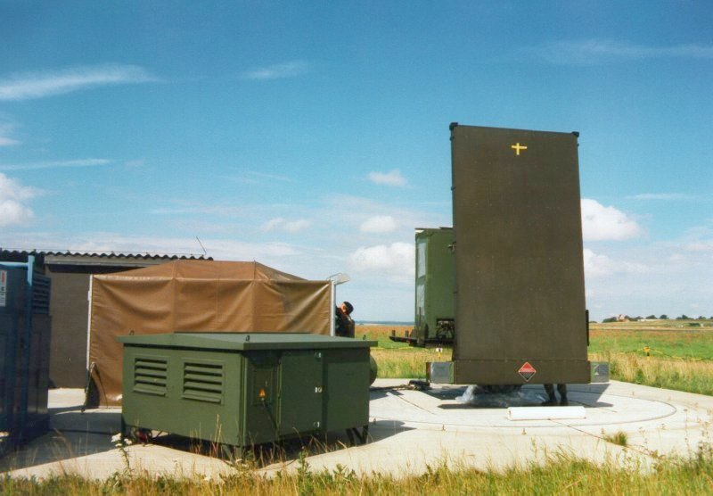 Präzisionsanflugradar auf einem militärischen Flugplatz, das Padom wurde zu Wartungszwecken entfernt